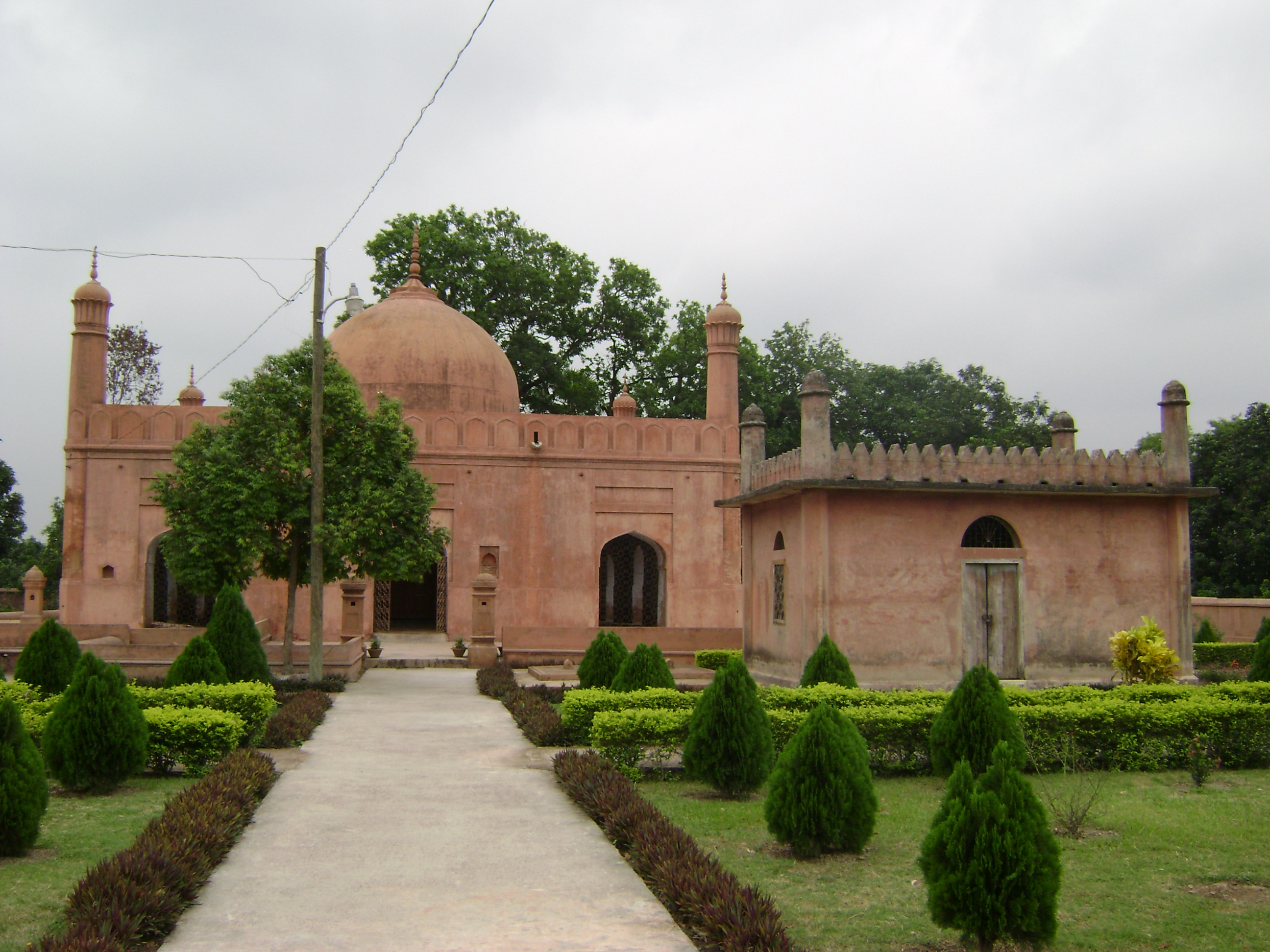 Doha khana, Chapai Nababgonj, Bangladesh